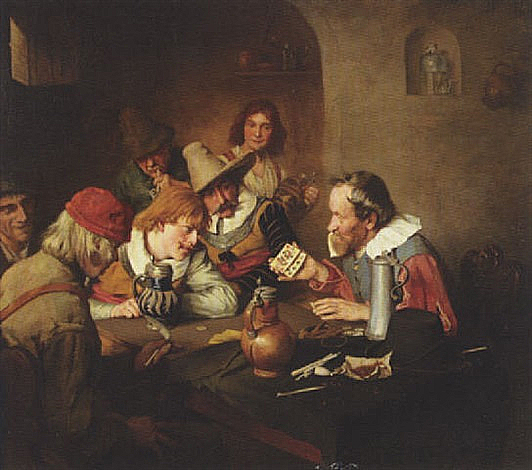 Die Kartenspieler